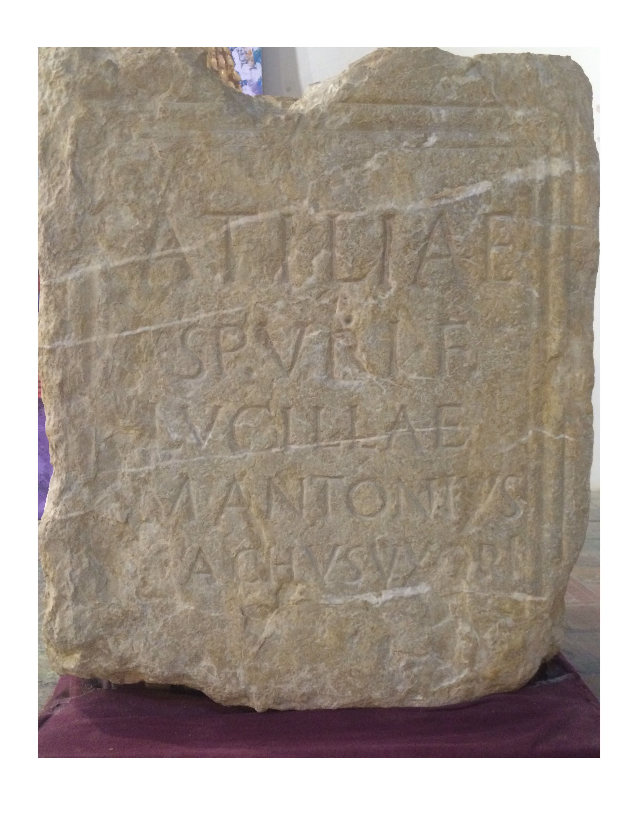 Estela romana Alt imperial del castell del remei